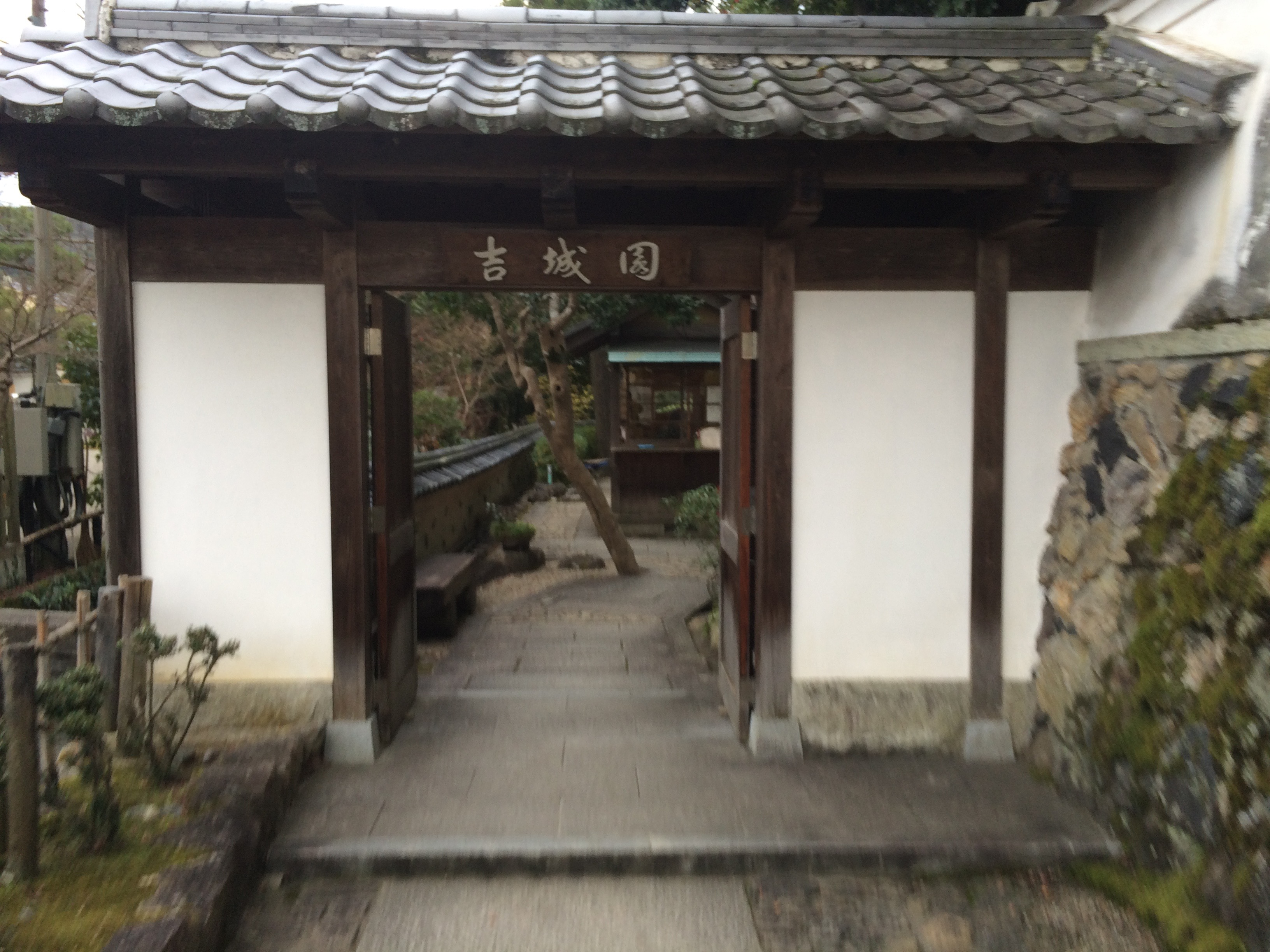 吉城園入り口